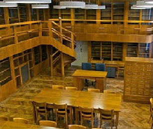 Historický kabinet s původním vybavením z roku 1930 (Reference Historický kabinet: pokračování seriálu o Knihovně FF UK [online]. FF UK, [cit. 2016-03-10].)